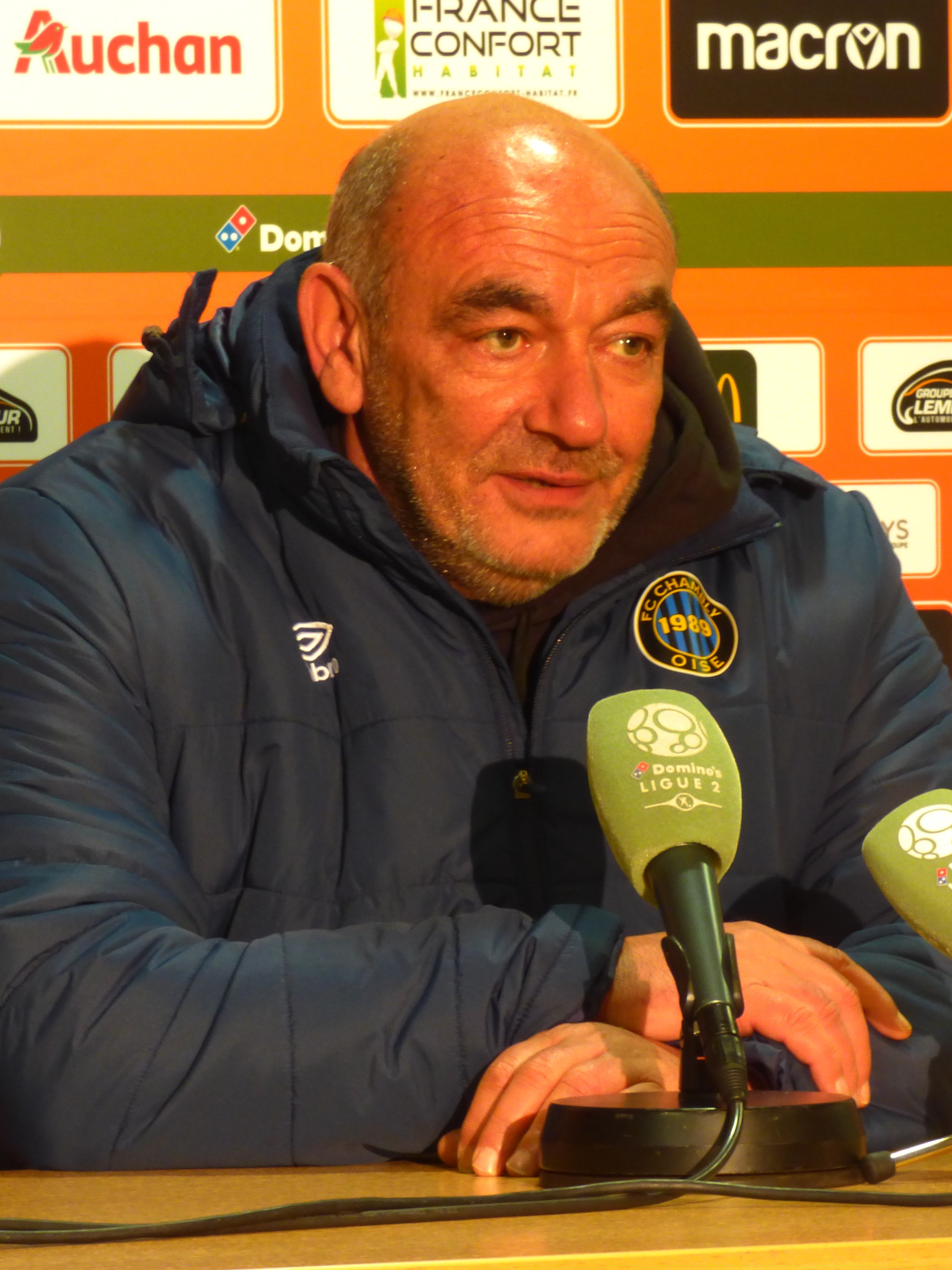 Bruno Luzi après le match Lens - Chambly, comptant pour la dix-septième journée du championnat de France de football de Ligue 2 2019-2020, le 3 décembre 2019.